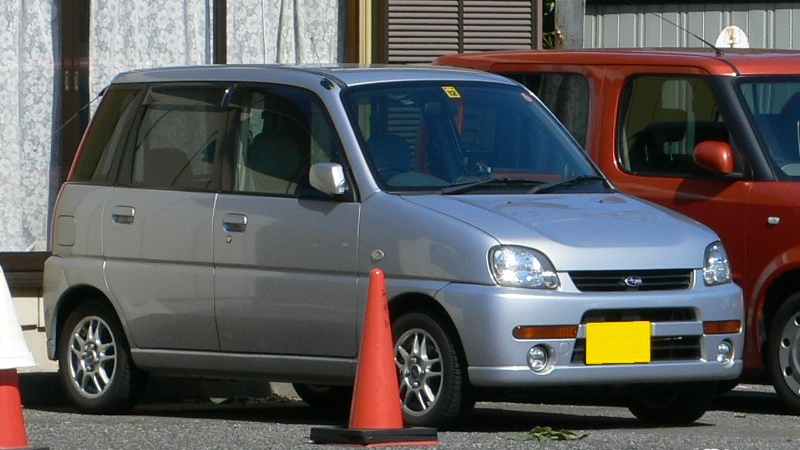 Subaru_Pleo(2002)